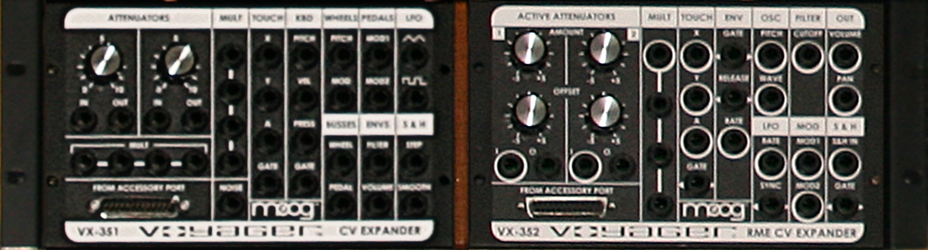 Moog VX-351 CV Expander (for minimoog Voyager) Moog VX-352 RME CV Expander (for minimoog Voyager Rack Mount Edition (RME))